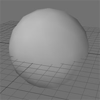 Ein Polyeder dessen Bildsynthese mittels eines Gouraud-Shading Algorithmus erfolgt ist. Siehe Interpolative Shading-Techniken.